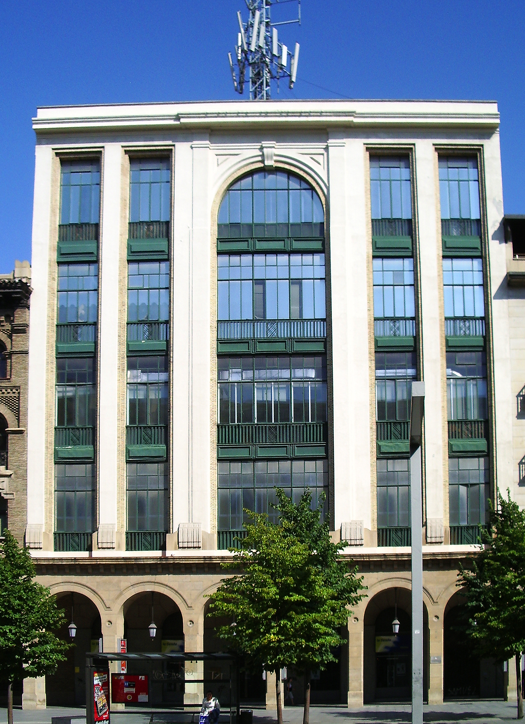 Edificio de la Telefónica, Paseo de la Independencia 35 (Zaragoza, España). Arquitectos: Ignacio de Cárdenas Pastor, José María Arrillaga de la Vega y Antonio Cañada. Año: 1927. Estilo: Racionalismo, vanguardia.